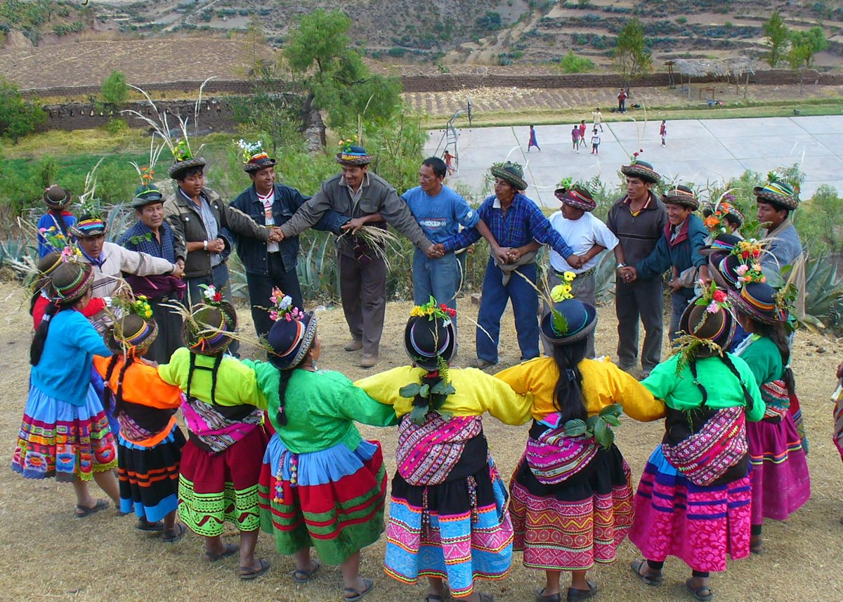 Danza tipica de Sarhua